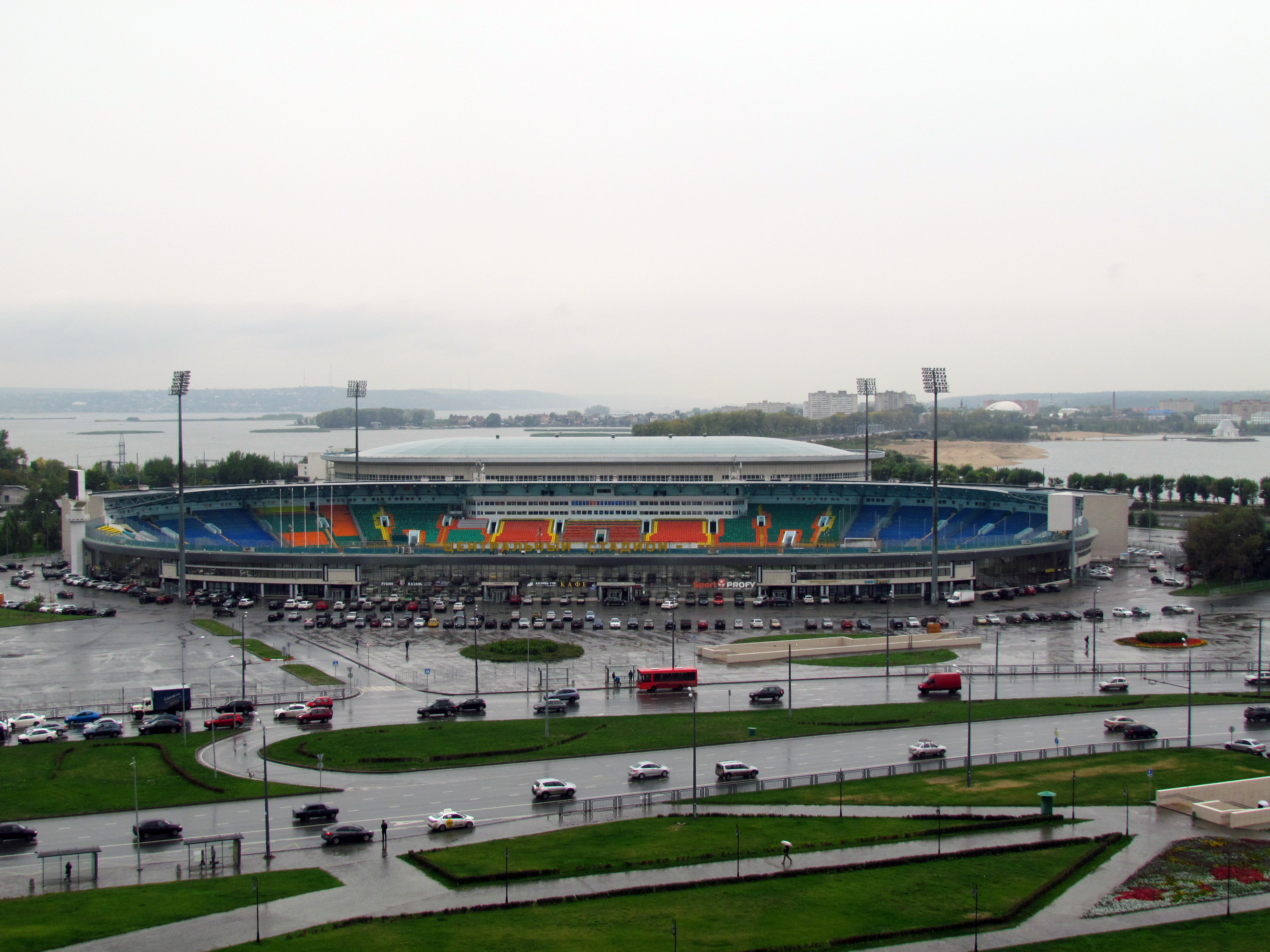 Стадион Центральный